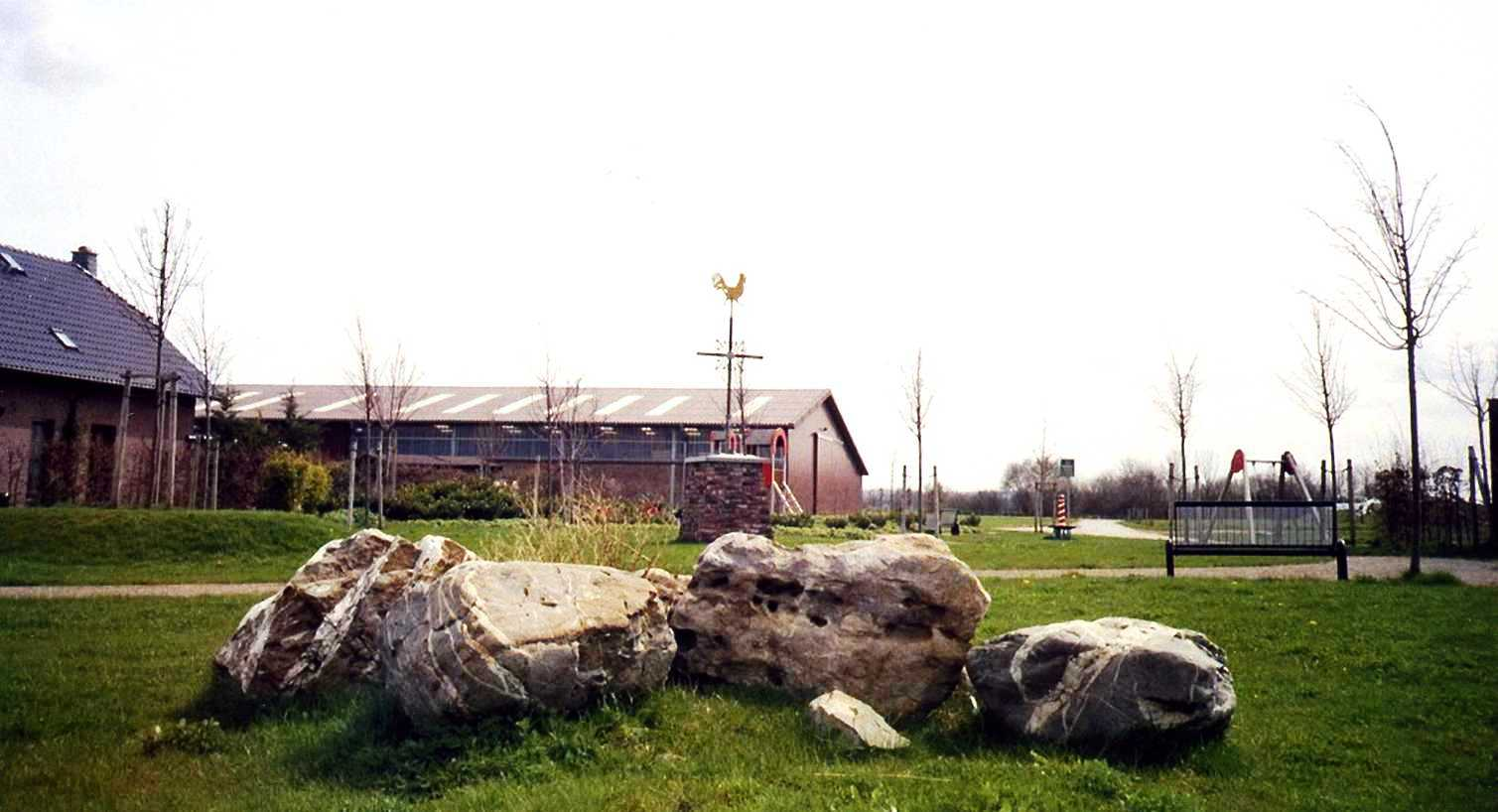 Weiler Hausen bei Aldenhoven - fotografiert und eingescannt von Benutzer: Eschweiler 2006